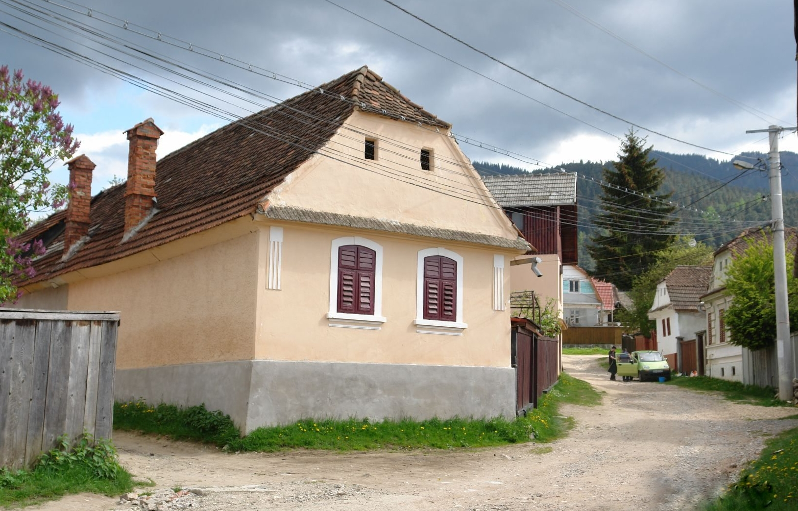 Négyfalu (Șapte Sate ? ) Darie Magheru ut. 37